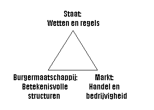 Description Democratische driehoek, de verhouding tussen markt, staat en civil society Date18 January 2007SourceEigen werk. Inspiratie: Zijderveld, A.C. (1999) The Waning of the Welfare State: The End of Comprehensive State Succor New Brunswick, Transaction Publishers.AuthorGebruiker Vangeest [1]Permission (Reusing this file) Ik geef eenieder het recht op verspreiding, wijziging en commercieel gebruik van deze creatie. Other versions Geen Democratische driehoek, de verhouding tussen markt, staat en civil society